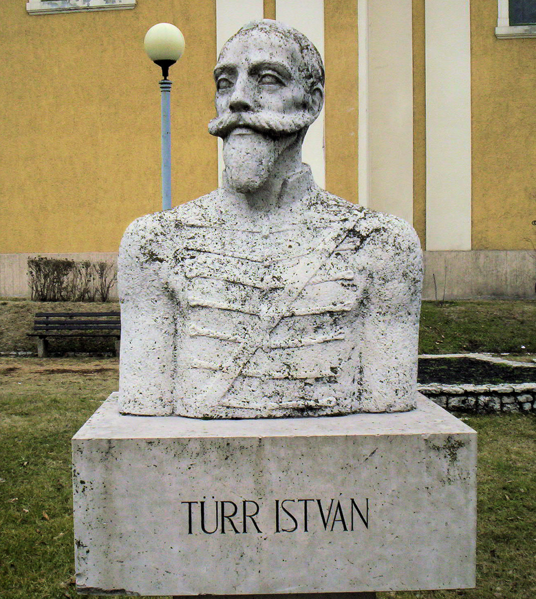 Türr István szobra Baján. Gera Katalin alkotása (1978). – photo taken by uploader User:Csanády in 2006.